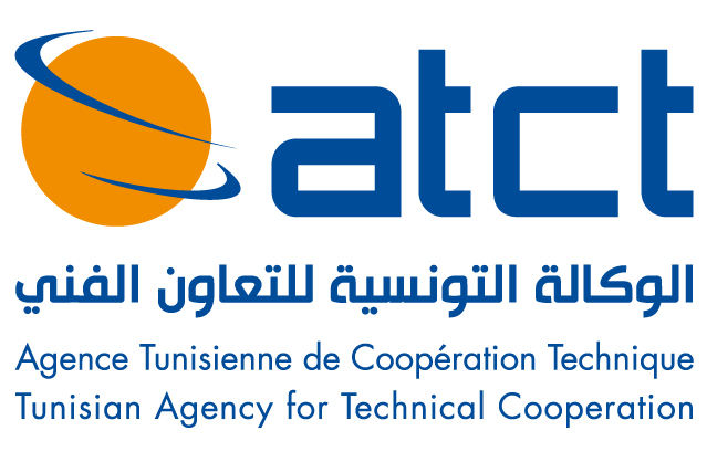 logo_atct